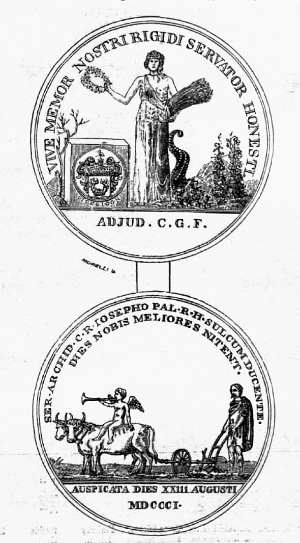 Georgikon emlékérem